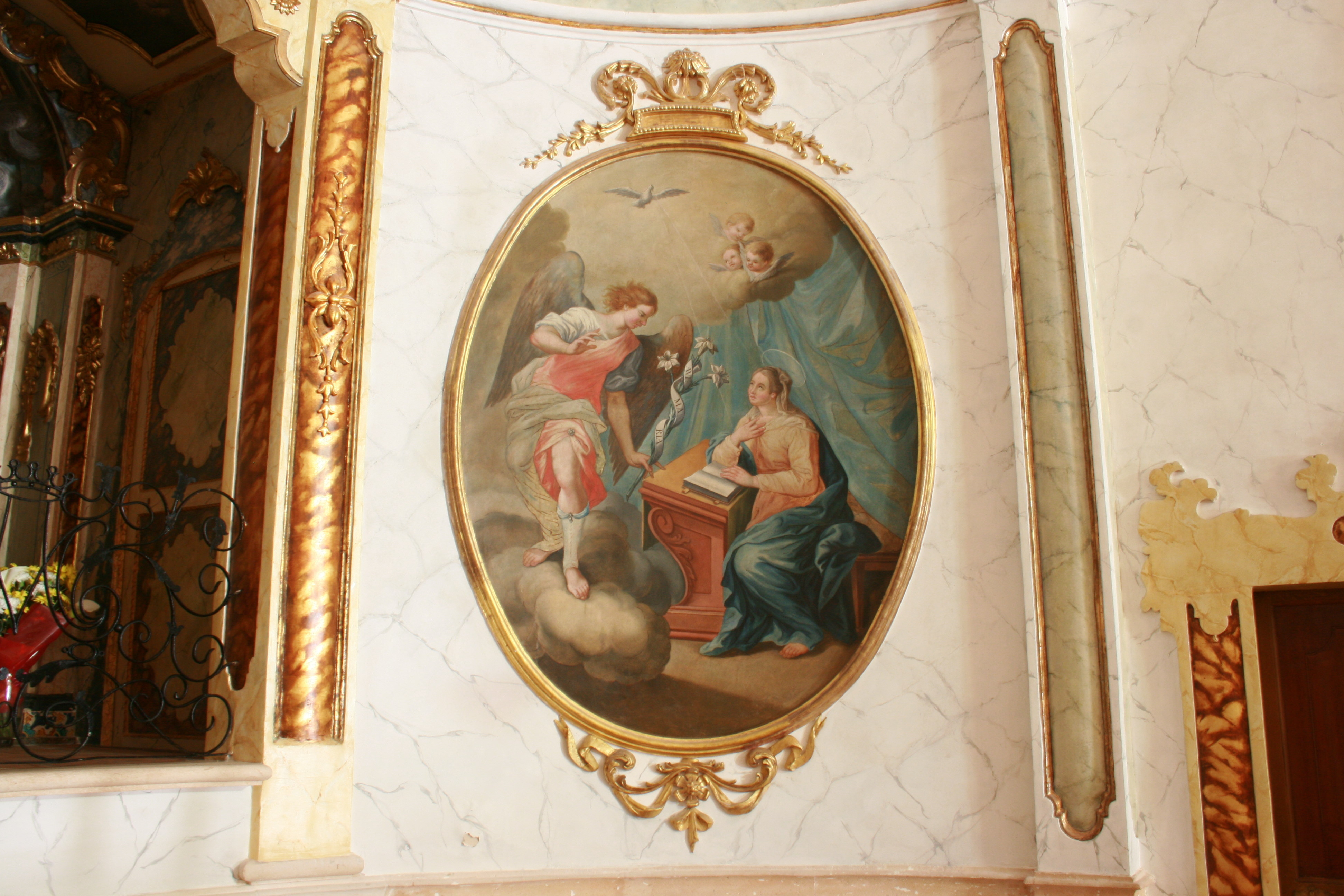 Santuari de Nostra Senyora de Gràcia, Puig de Randa in Algaida, Mallorca